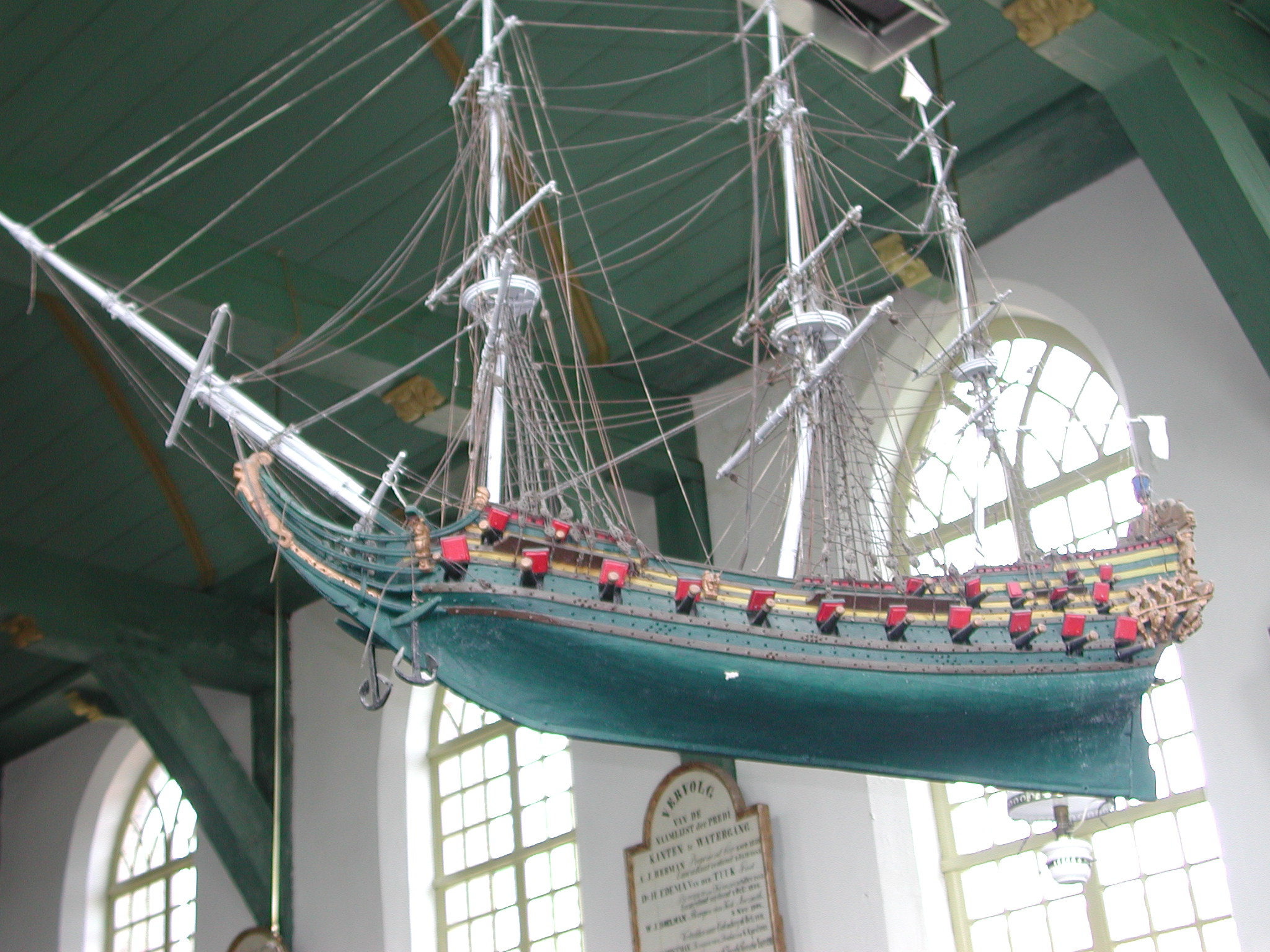 Watergang, kerkscheepje in de Nederlands Hervormde kerk